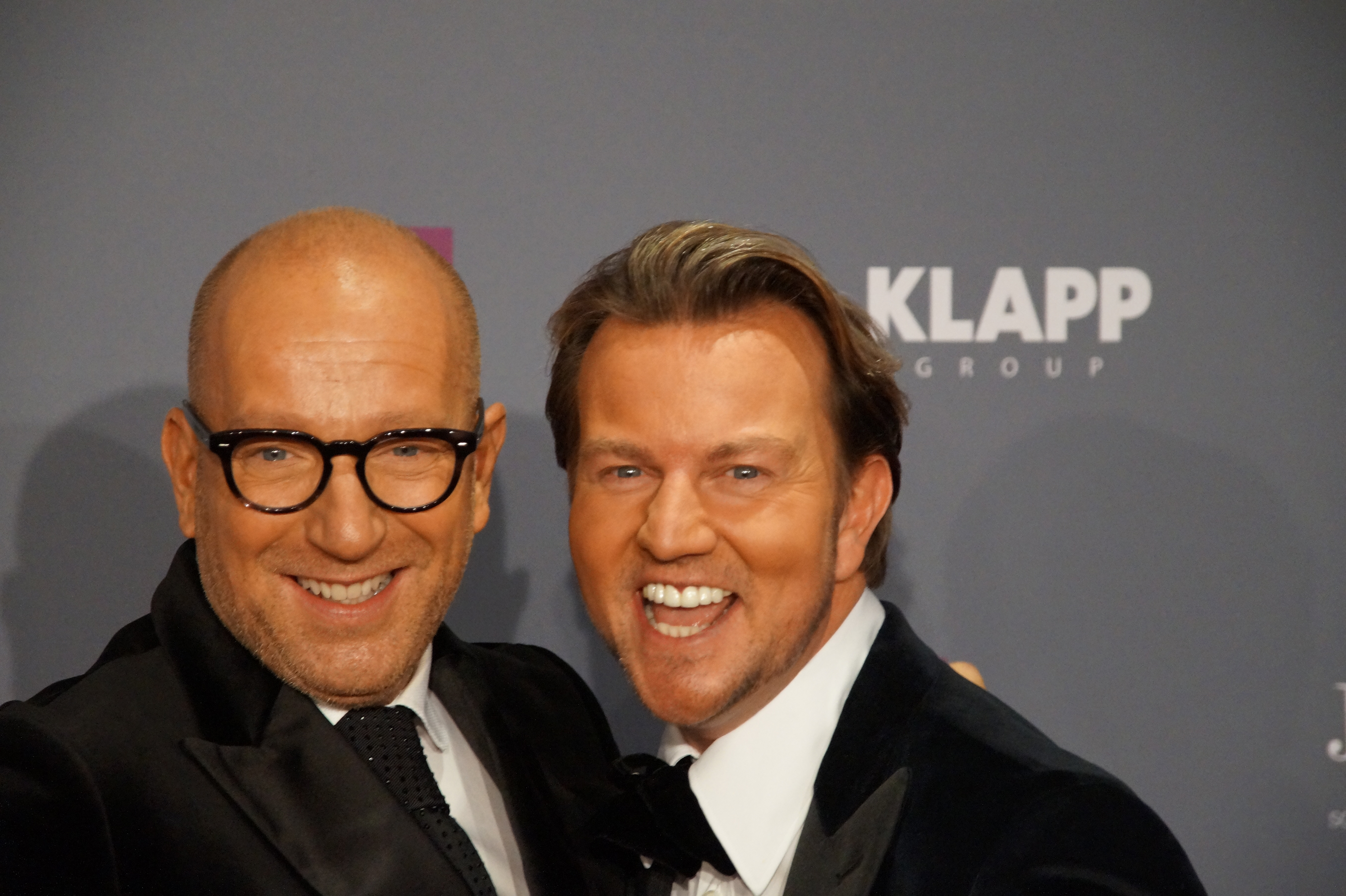 Thomas Rath und Sandro Rath beim "Gloria – Deutscher Kosmetikpreis" am 04. März 2016 im Hilton Hotel Düsseldorf.